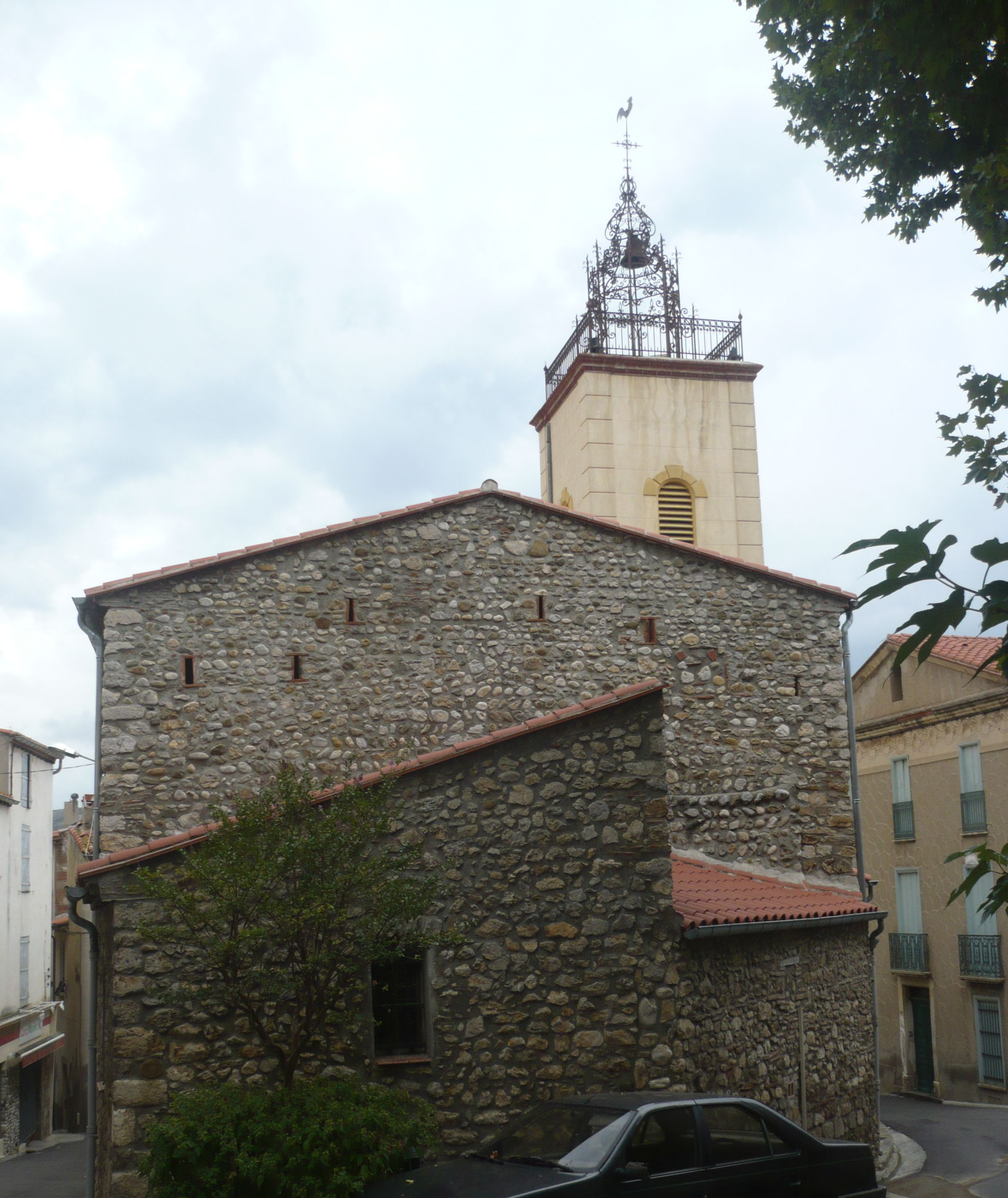 L'église Saint-Génis de Tautavel